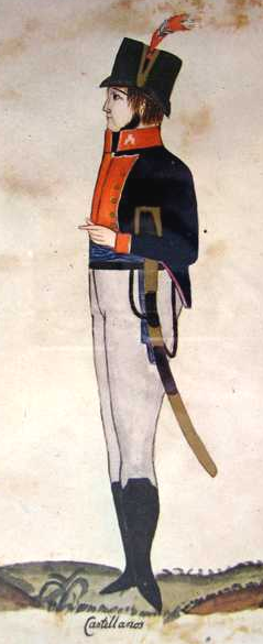 Uniforme de oficial del Tercio de Vizcaínos, compañía 1° de Castellanos Viejos